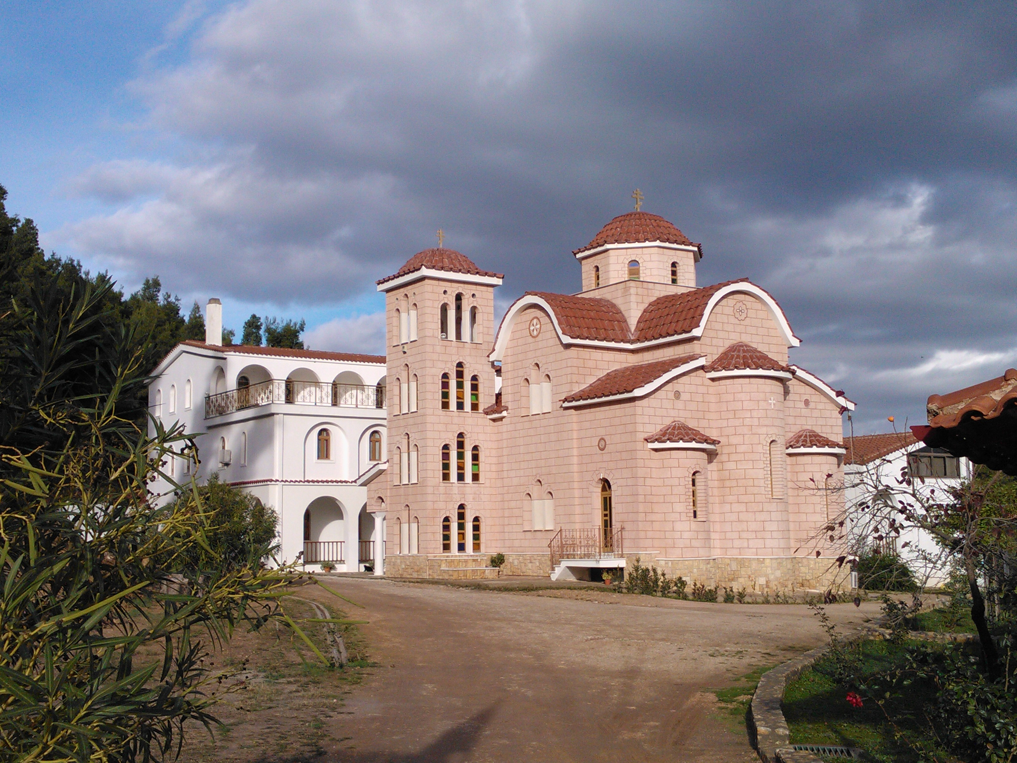 Монастырь Святых Ангелов в Афиднес